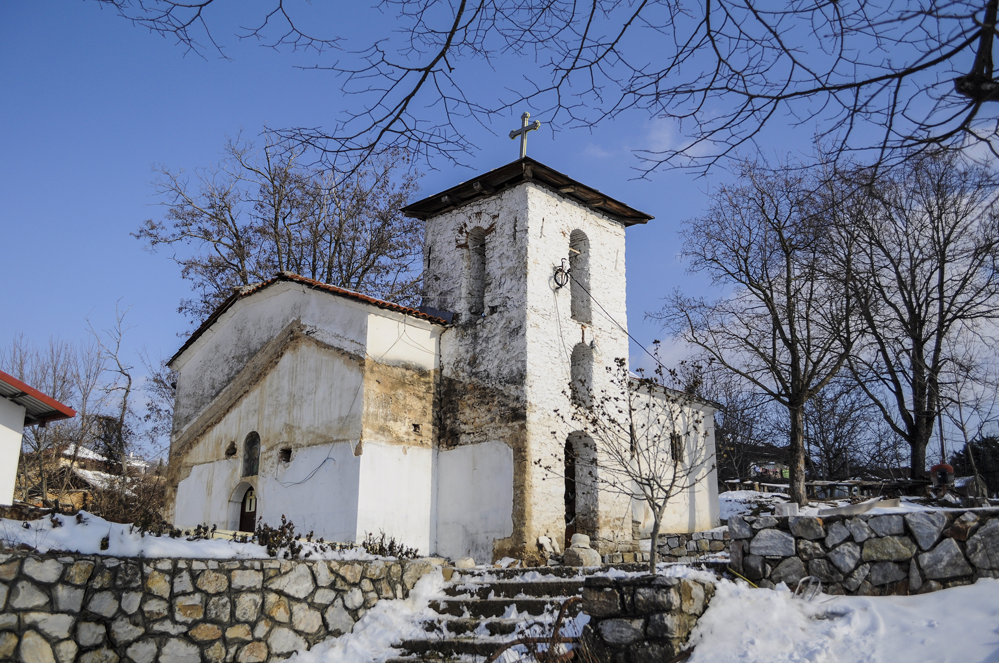 Црквата Свети Спас во Долно Соње. Во летото 2016 година е срушена и на нејзино место се гради нова црква.